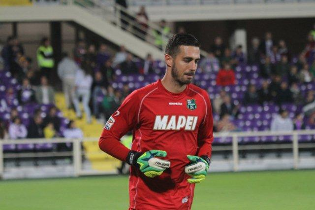 Andrea Consigli (Milano, 27 gennaio 1987) è un calciatore italiano, portiere del Sassuolo. (from it.wp)